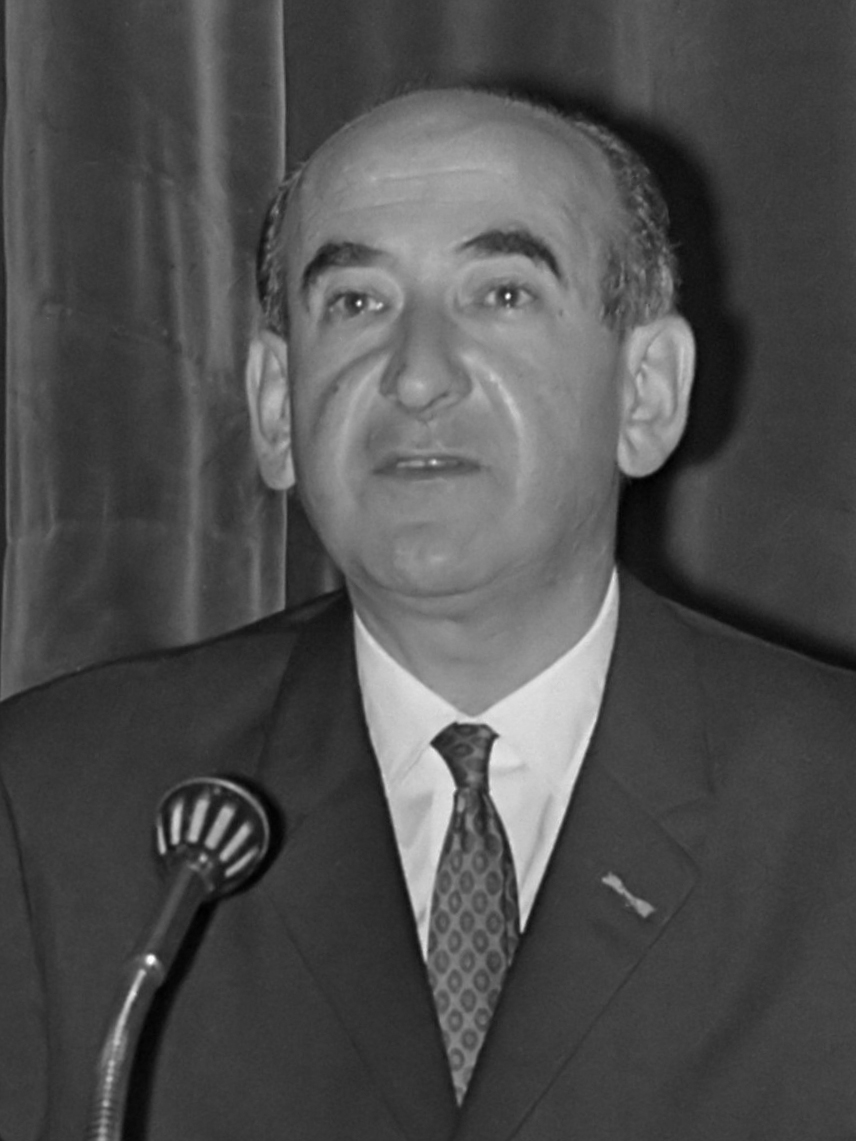 Conferentie Europese Beweging, nr. 28 , 29: Dr. M. Weisglas 17 oktober 1968